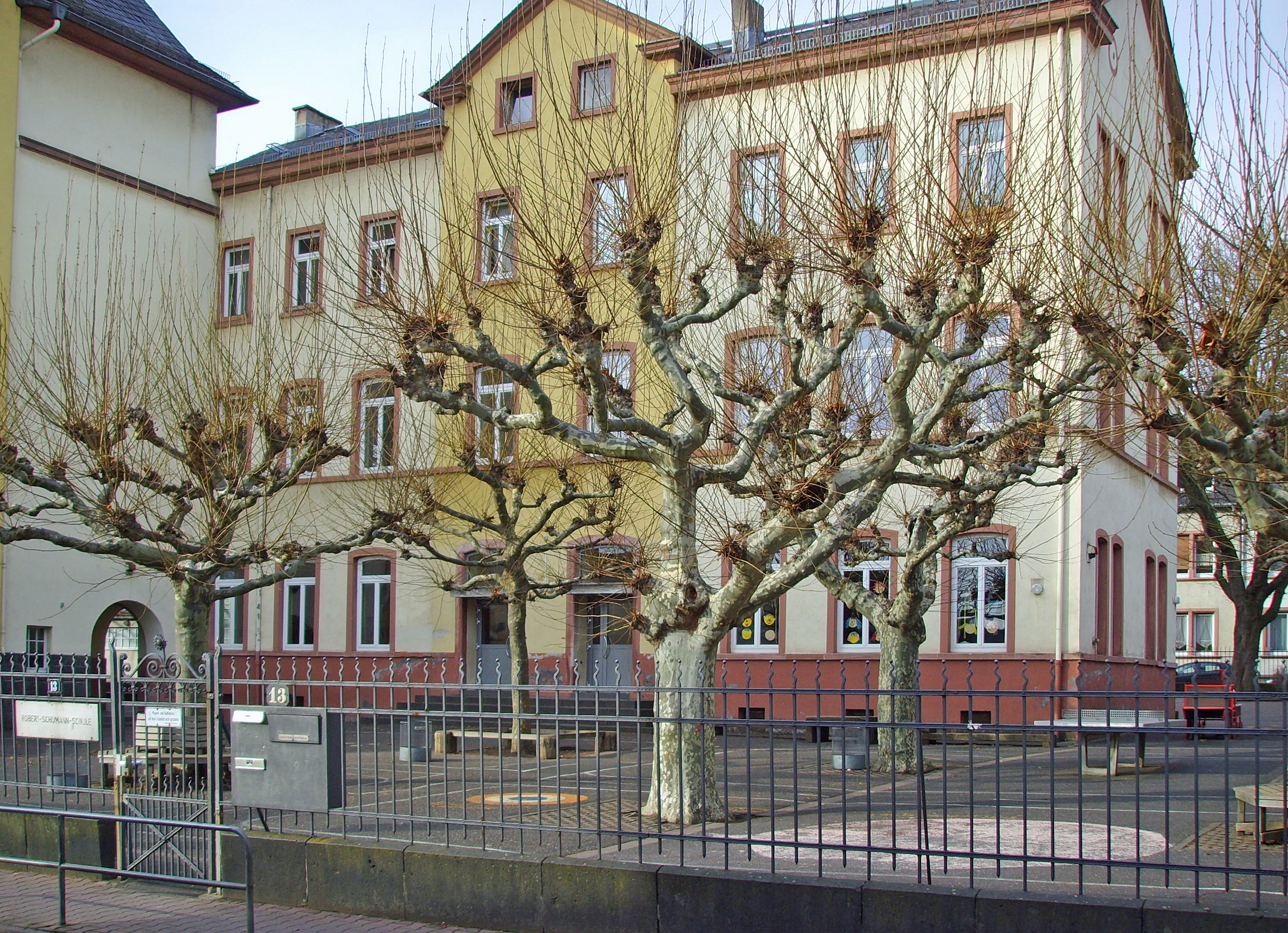 Frankfurt am Main-Heddernheim, Robert-Schumann-Schule